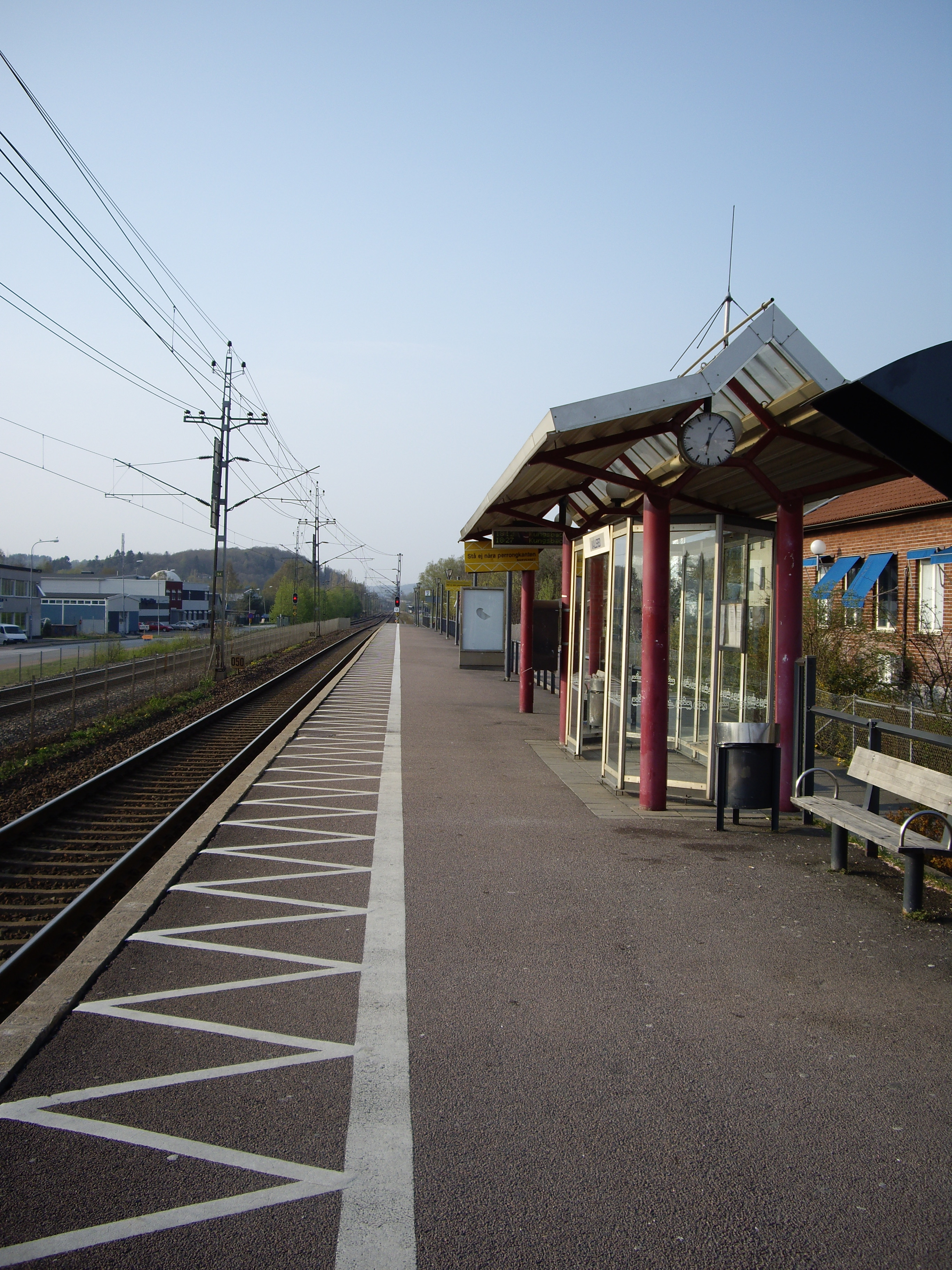 Kållereds pendelstation i riktning Göteborg